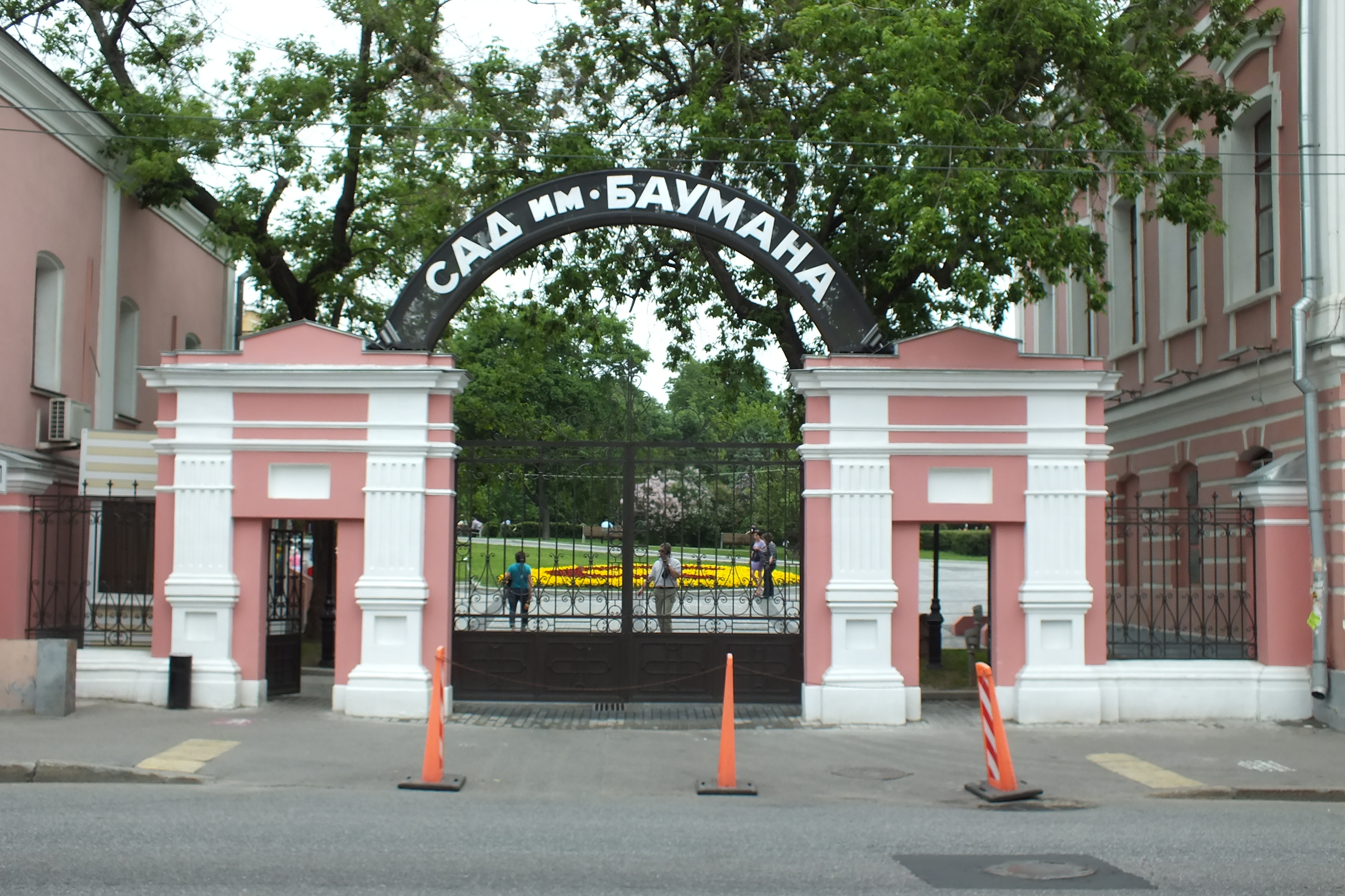 Вход в Сад имени Н. Э. Баумана со стороны Старой Басманной улицы